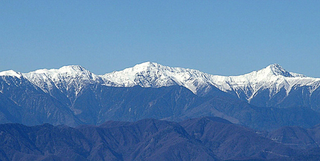 白峰三山（南アルプス・静岡県毛無山から撮影・左から農鳥岳、間ノ岳、北岳）Shirane-sanzan (Akaishi ranges, JAPAN)